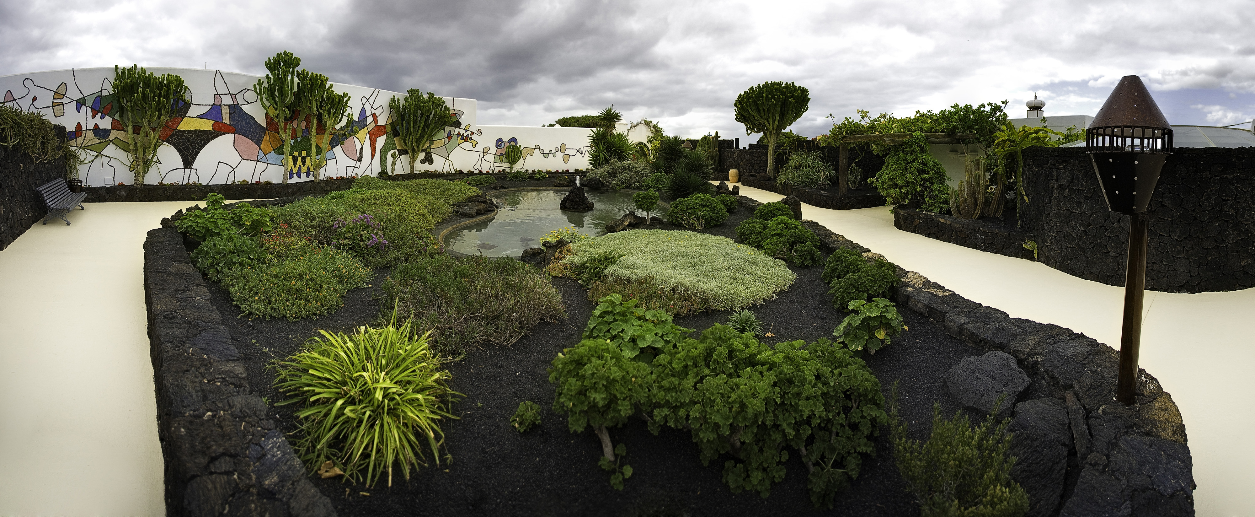 Fundacion, Cesar Manrique, Lanzarote